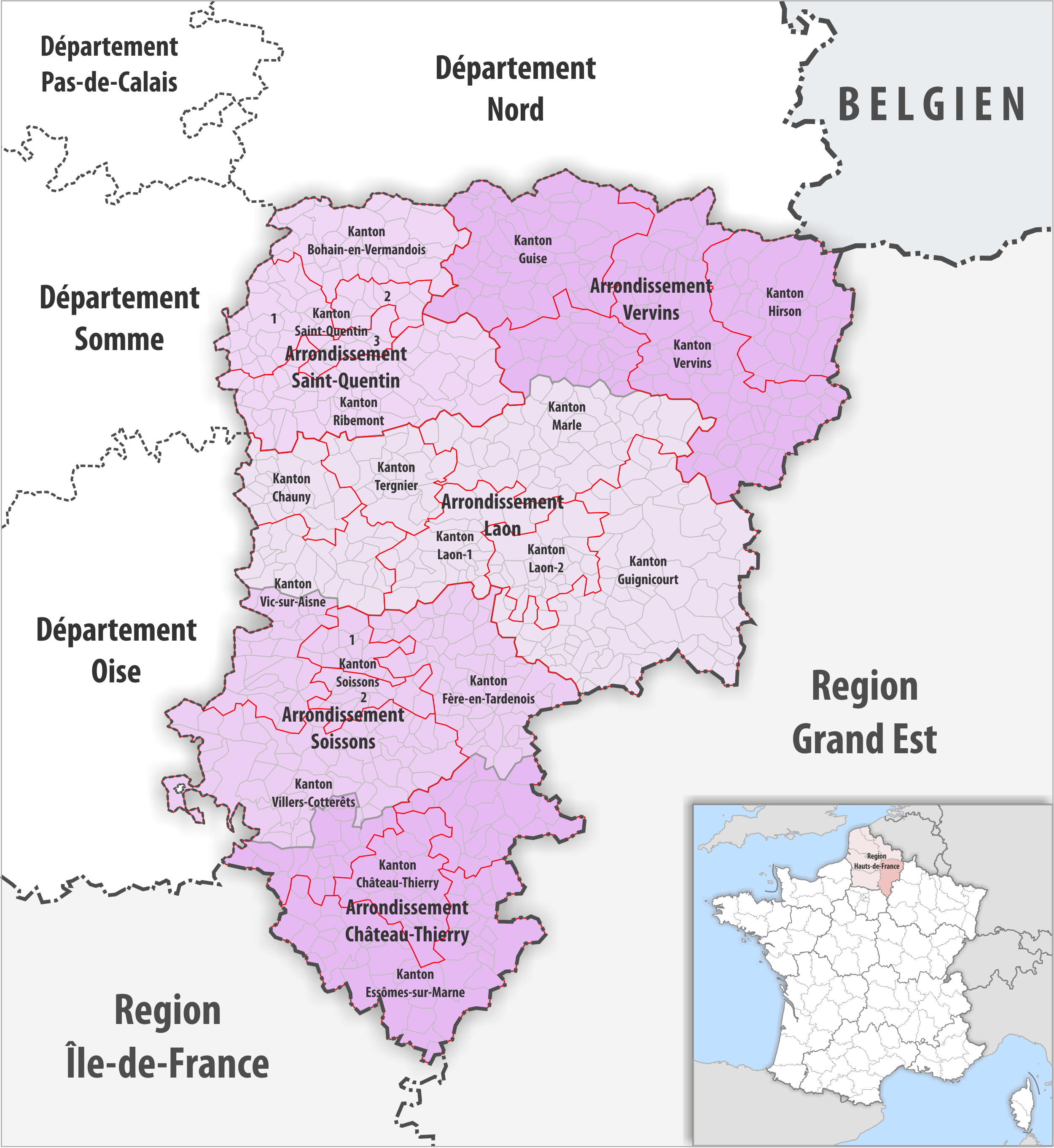 Gemeinden, Kantone und Arrondissemente im Departement Aisne